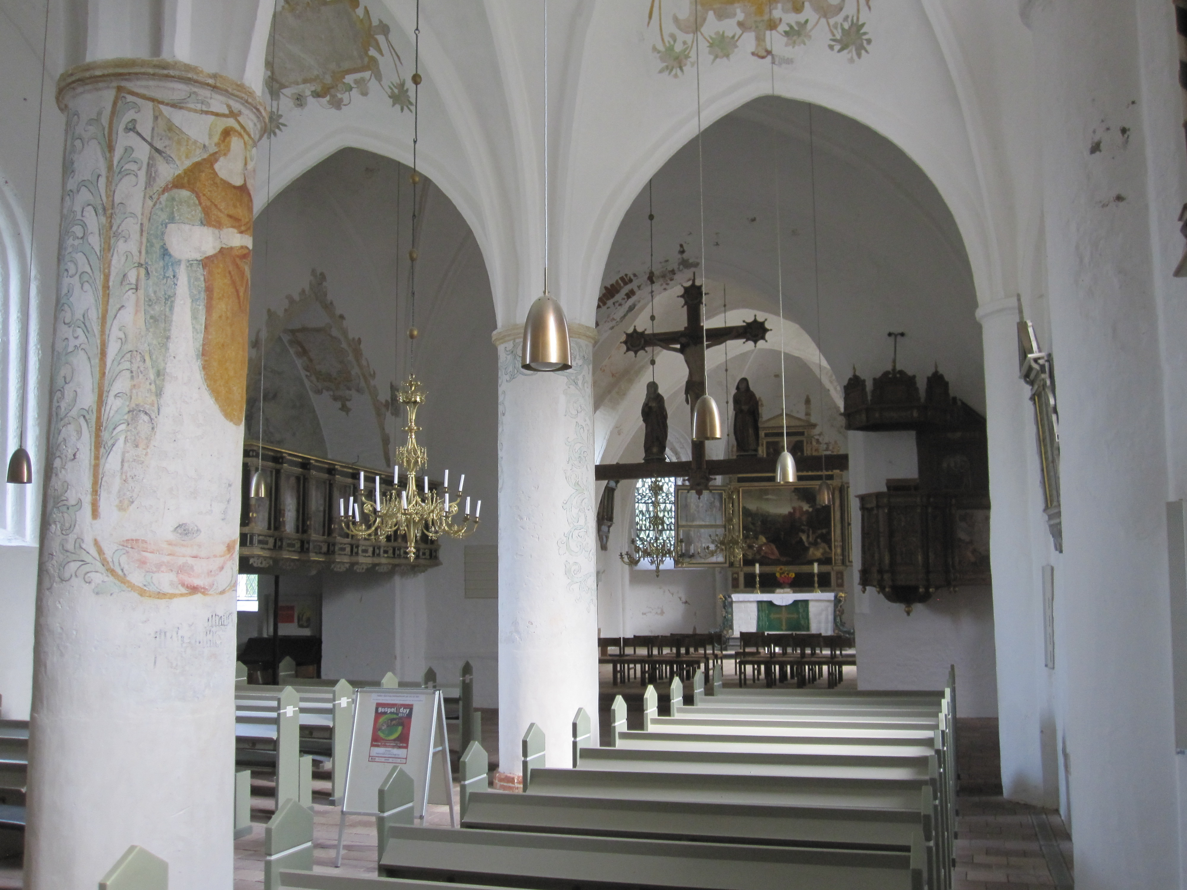 Die St.-Christians-/St.-Bartholomäus-Kirche steht in Gardings Ortsmitte auf einer elf Meter hohen Warft, der höchsten Erhebung Eiderstedts. Der Kirchturm ist noch heute der höchste Punkt Eiderstedts und diente lange als Seezeichen. Mit ihrem gotischen Orgelprospekt von 1512 hat die Kirche den ältesten Orgelprospekt Nordeuropas. Das ehemals gotische hohe, spitze Dach der Kirche wurde bei einer Renovierung 1854 durch ein besser in die Landschaft passendes und vor allem weniger windanfälliges, niedrigeres Dach ersetzt . Die Kirche geht auf die 1117 errichtete einschiffige, kreuzförmige Backsteinkirche St. Christian zurück. Sie war ursprünglich den Heiligen Maria Magdalena, Christian und Bartholomäus geweiht. Die Kirche wurde von 1483 bis 1488 zu einer zweischiffigen gotischen Hallenkirche umgebaut, wobei ein Schiff den männlichen und ein Schiff den weiblichen Gottesdienstbesuchern diente. Nachdem Hermann Tast 1524 noch auf dem Marktplatz die erste Reformationspredigt Eiderstedts gehalten hatte, setzte sich die Reformation durch Christian III. von Dänemark bis 1527 in der Region durch. Sichtbar ist dies in der Kirche an der zerschlagenen Altarplatte mit der Aufschrift „Hic sunt reliquiae reconditae“ (Hier sind die Reliquien aufbewahrt). 1563 baute die Gemeinde eine Kanzel. Sie ist die älteste Kanzel Eiderstedts und wurde mit ihrem sechseckigen Grundriss zum Vorbild fast aller anderen Kanzeln im Lande.